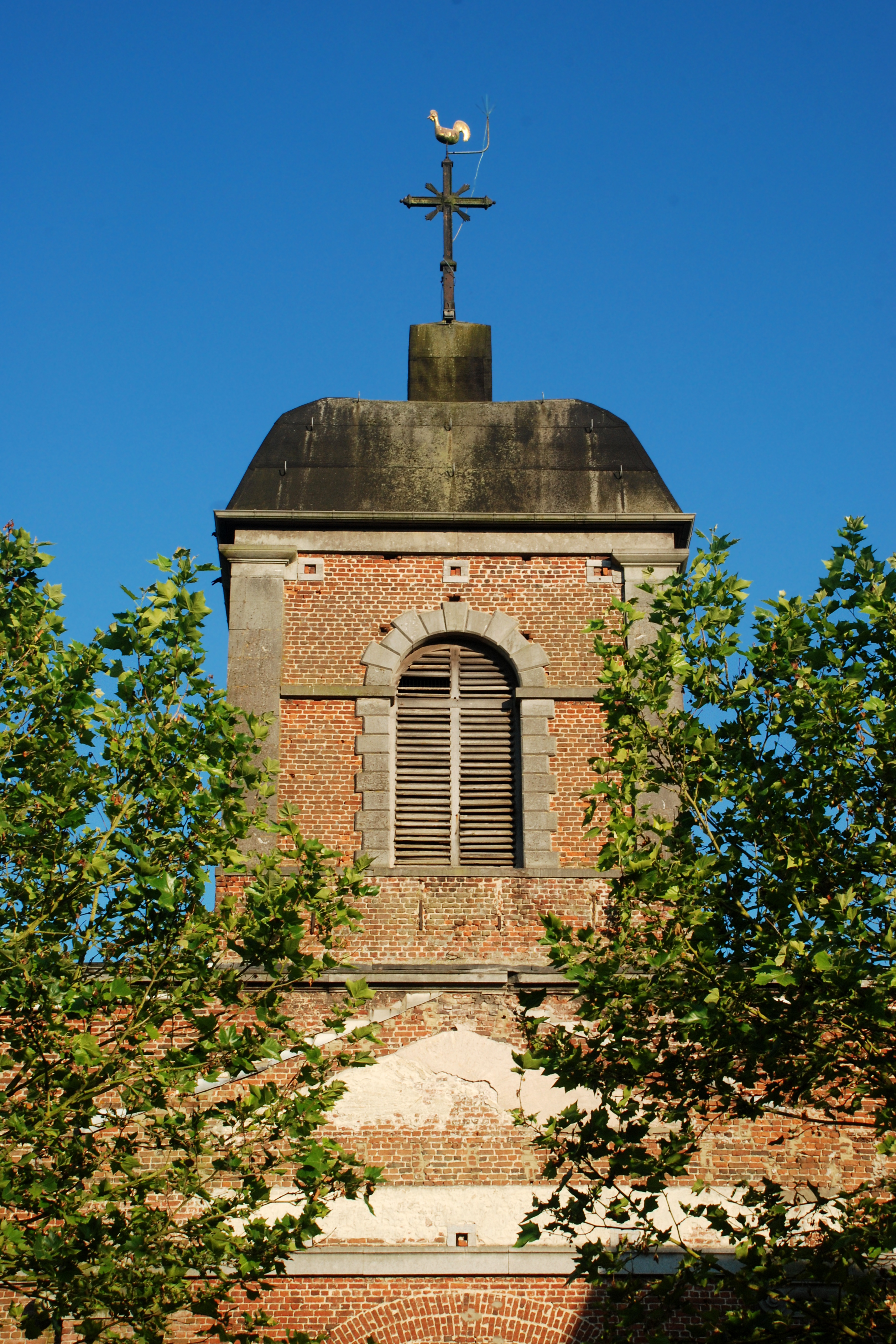 Belgique - Brabant wallon - Genappe - Loupoigne - Église Saint-Jean-Baptiste